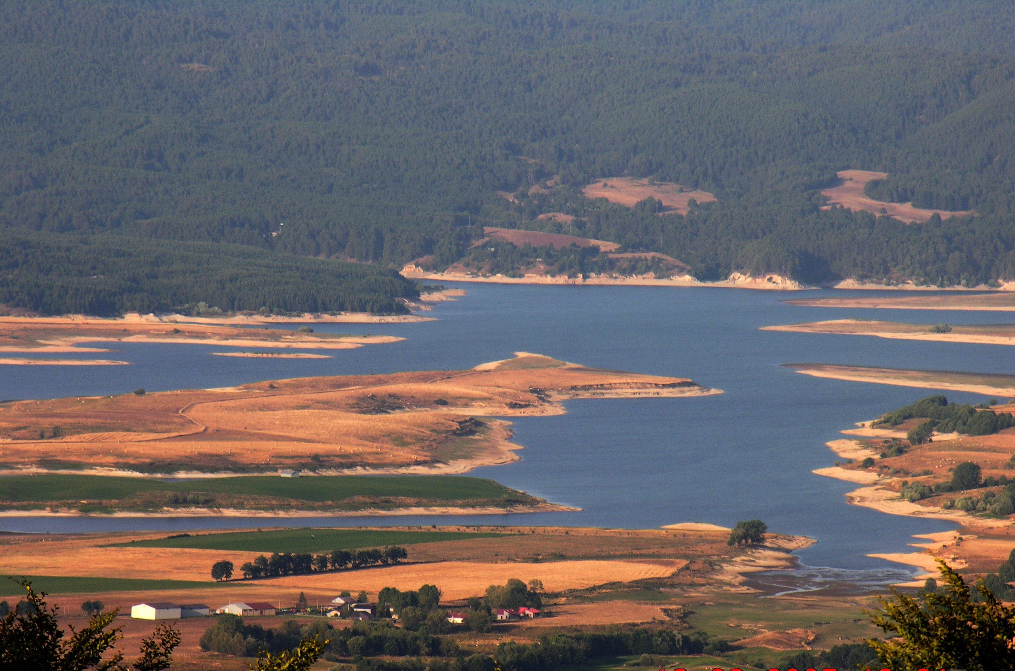 Veduta del lago Cecìta da Monte Scuro